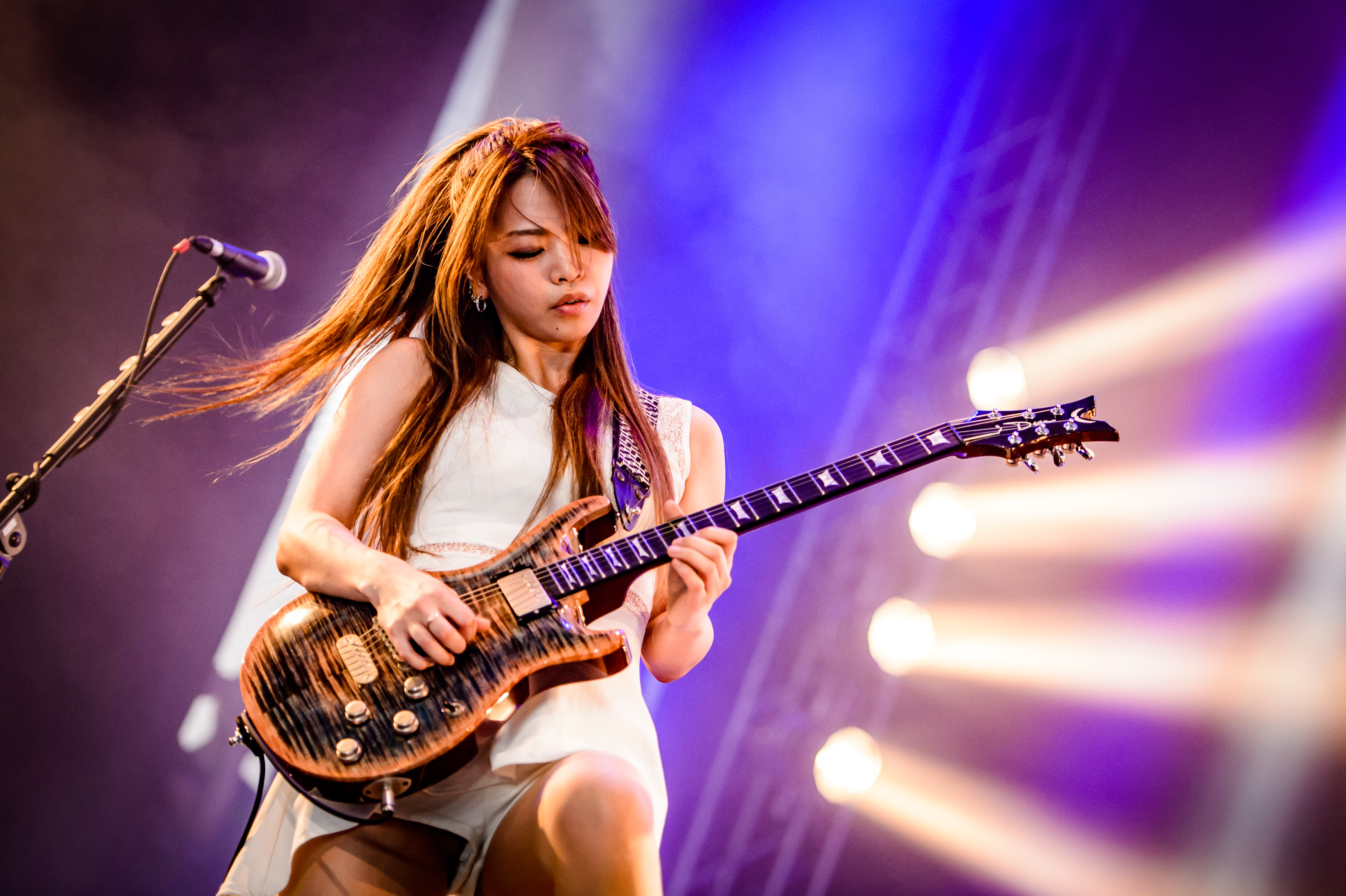 'Wacken Open Air 2018': 'Lovebites'